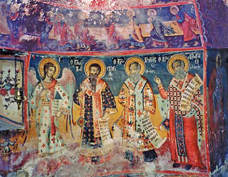 Поклонение пред агнеца, апсида "Свето Преображение" в Самарина, 1819